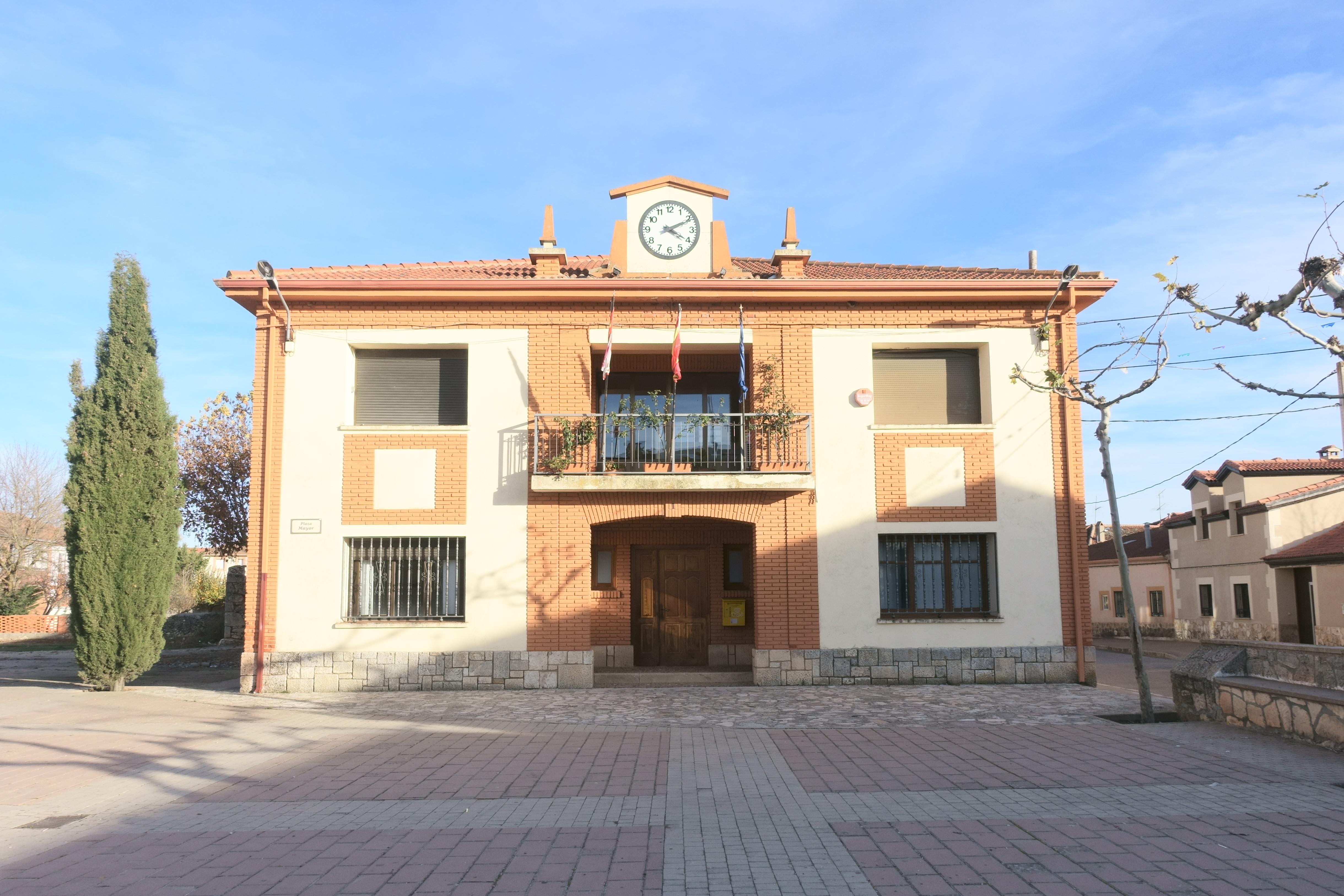 Casa consistorial de Campo de San Pedro (Segovia, España).